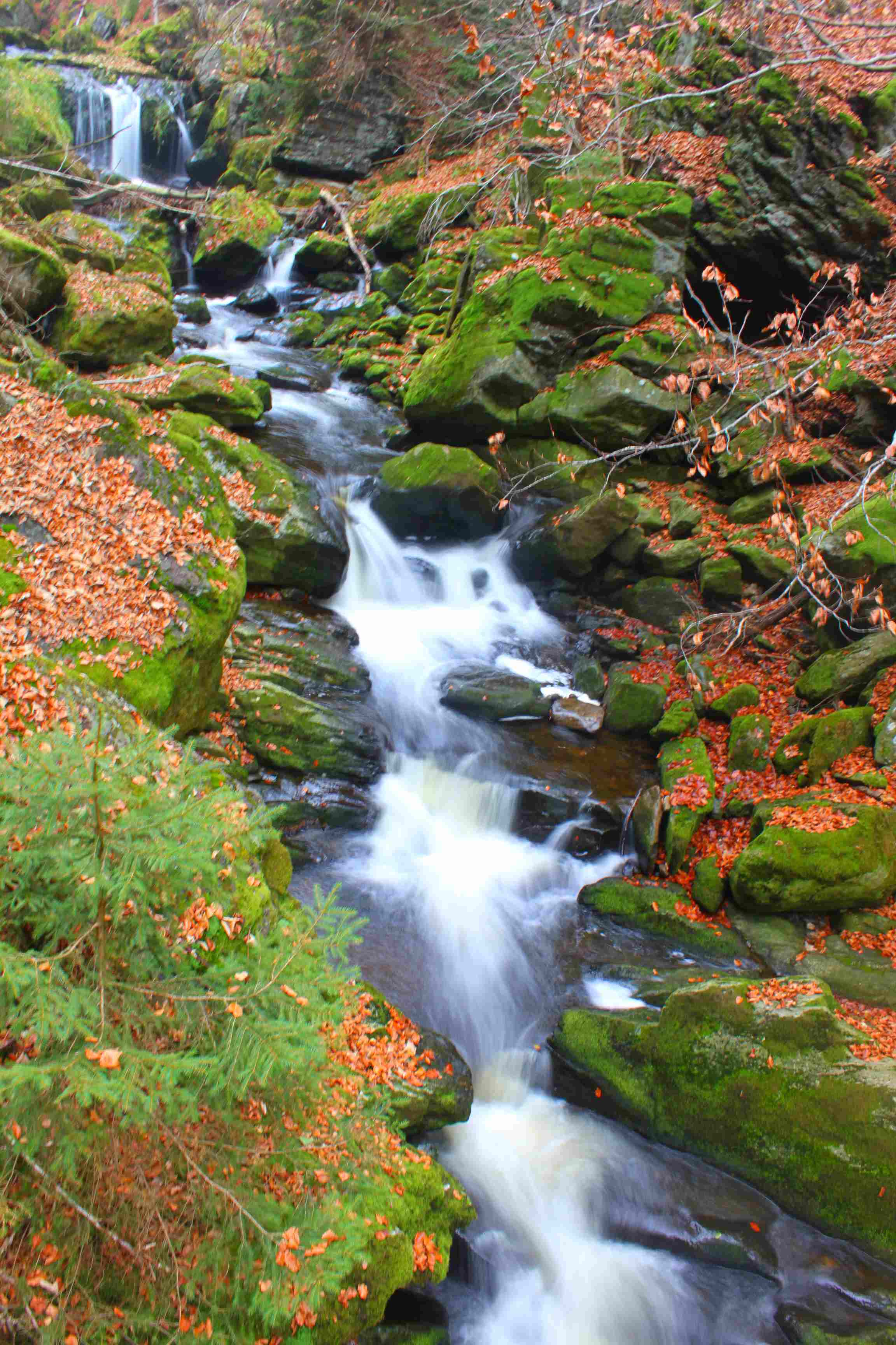 Die Steinklamm ist eine bis zu 100 m tiefe Schlucht in Spiegelau